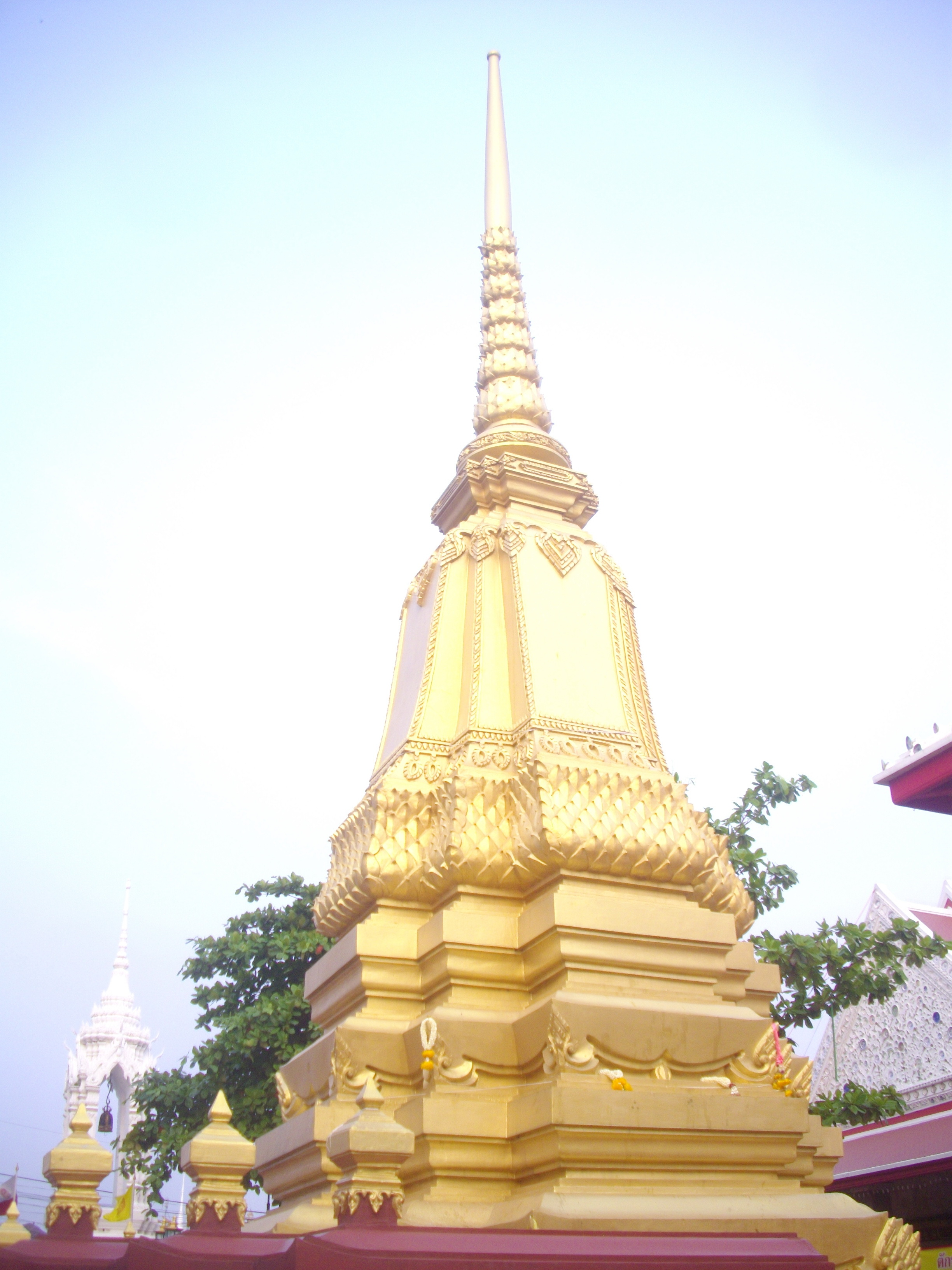 พระสถูปบรรจุพระบรมอัฐิของสมเด็จพระเจ้าตากสินมหาราช ณ วัดอินทาราม (วัดบางยี่เรือนอก หรือวัดบางยี่เรือใต้) แขวงบางยี่เรือ เขตเทอดไทย กรุงเทพมหานคร